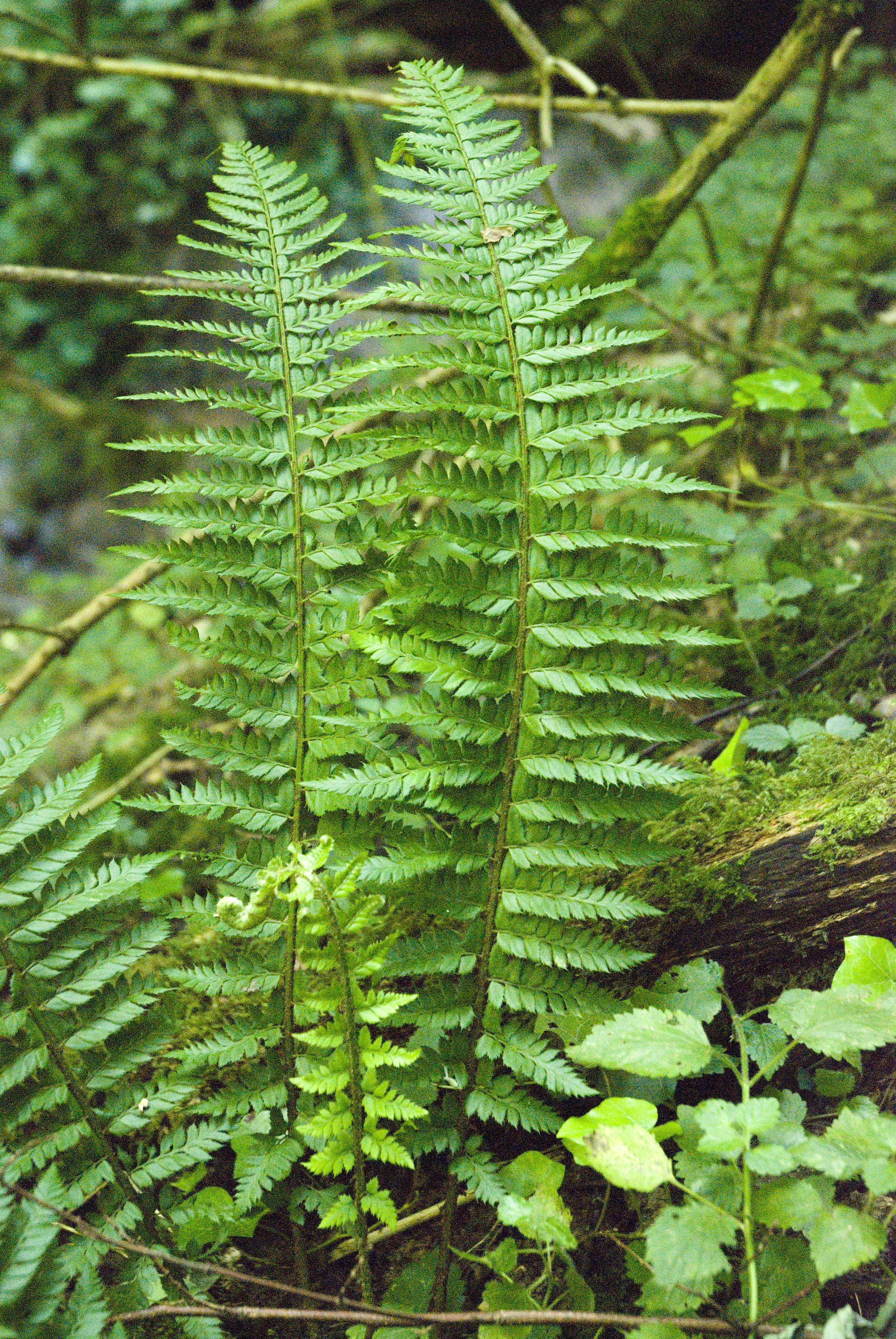 Polystichum aculeatum Vallon de la ferme le Colombier à Château-Thierry (Aisne), France